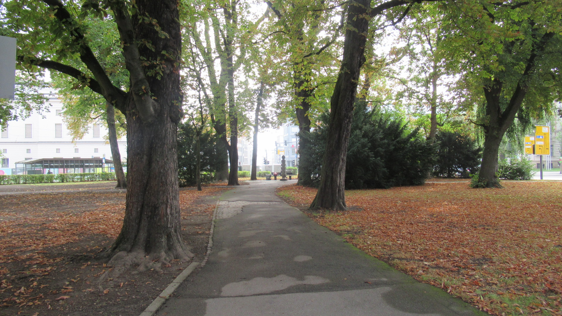 Augsburg-Bahnhofsviertel: Grünanlage Stadtpflegeranger an der Straße Am Alten Einlaß; hinten mittig die „Geschichtssäule“; im Hintergrund links die Volkhartstraße mit der AVV-Haltestelle „Staatstheater“ und das Staatstheater Augsburg.